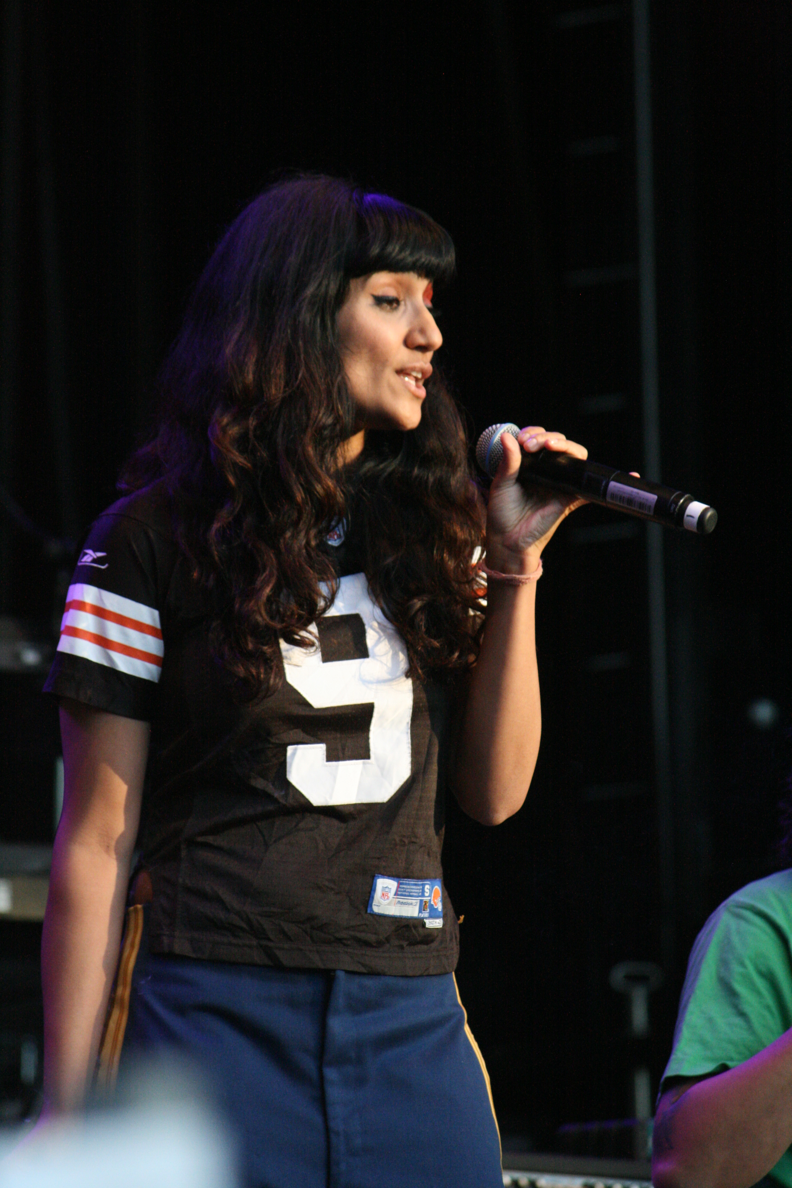 Musikk for Gaza, Oslo 3.9.2014 Samsaya